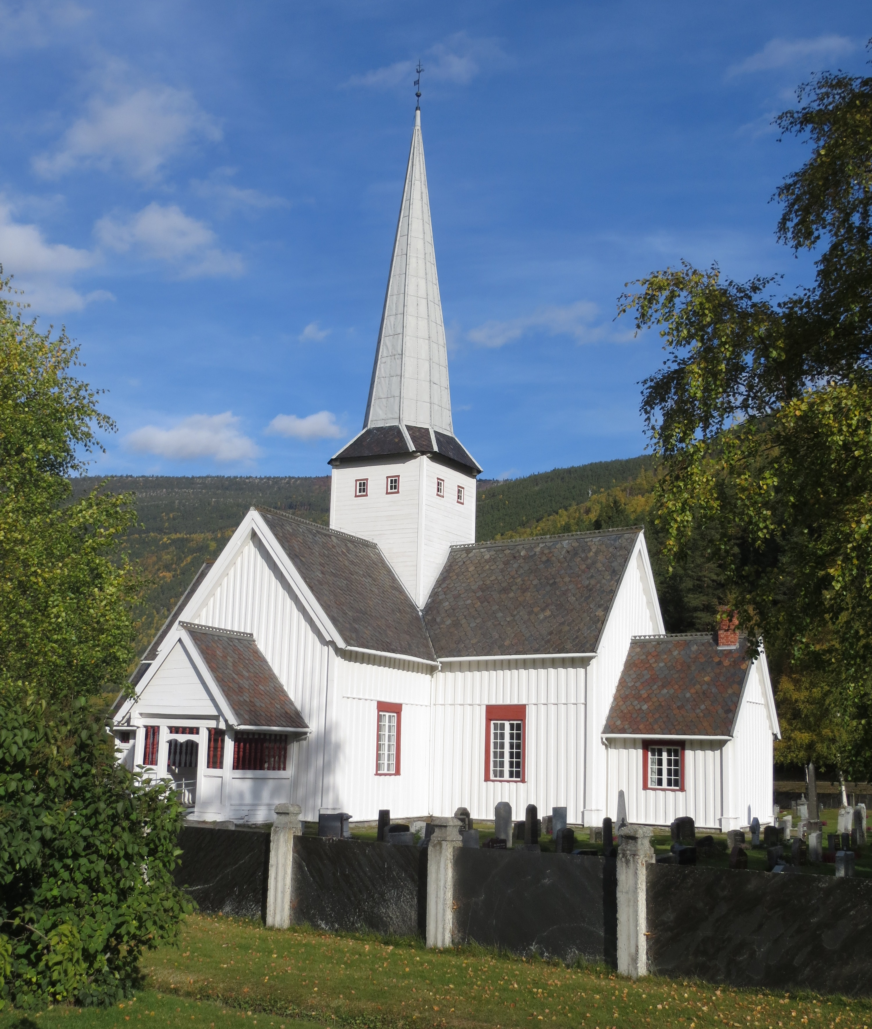 Sel kirke, i kommunen Sel i Gudbrandsdalen, Oppland.